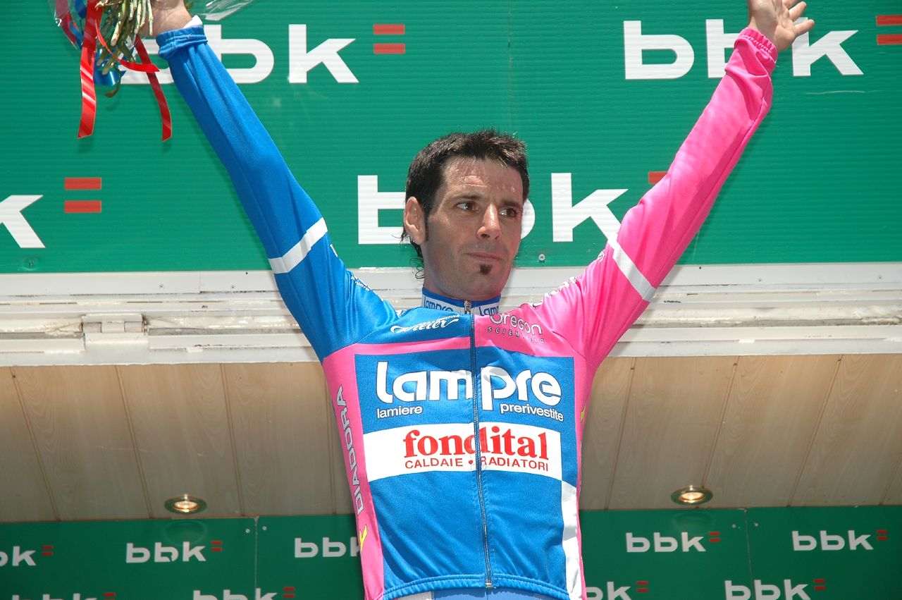 Patxi Vila, Euskal Bizikleta 2007